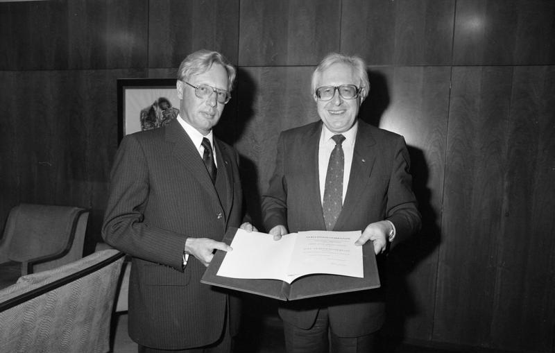 Bonn, 20. Oktober 1988 Der Präsident des Bundesrats, Ministerpräsident Dr. Bernhard Vogel, überreichte dem Direktor des Bundesrats, Georg Berndt Oschatz, das vom Bundespräsidenten verliehene Verdienstkreuz I. Klasse des Verdienstordens der Bundesrepublik Deutschland. Georg Berndt Oschatz, der das Amt des Bundesratsdirektors seit Mai 1987 innehat, war zuvor fünf Jahre lang Kultusminister in Niedersachsen.